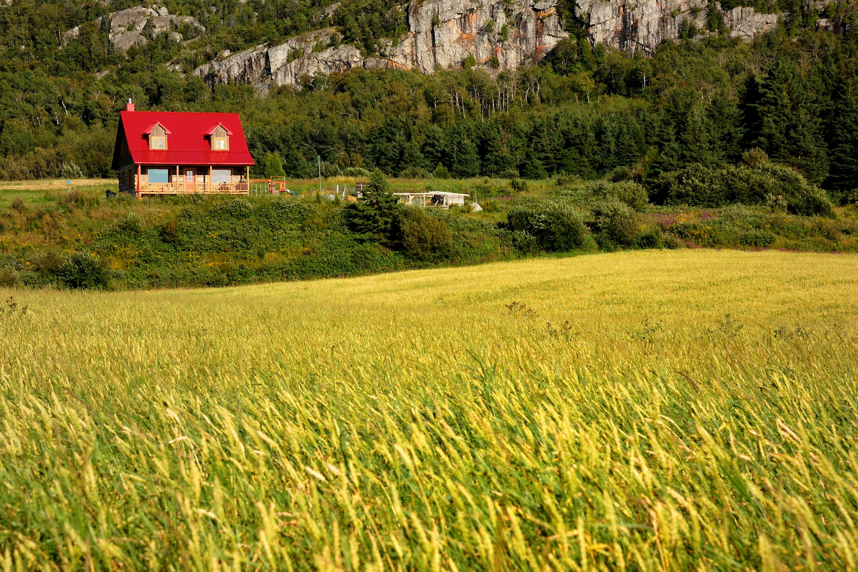 Une maison rouge à Saint-André-de-Kamouraska (Québec).